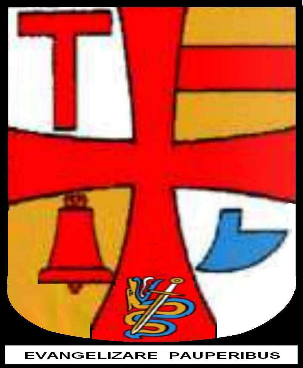 Wappen Bischof Franz Kamphaus * 1932 Bischof von Limburg 1982-2007 Blasonierung: Schild durch breitendiges rotes Kreuz, in dessen Fuß ein blau-goldener Drache mit Flügeln und Vorderpfoten sitzt, geviertelt; Feld 1 rotes Taukreuz in Silber, Feld 2 roter Balken in Gold (Bistum Münster), Feld 3 rote Glocke in Gold und Feld 4 blaue Pflugschar in Silber.